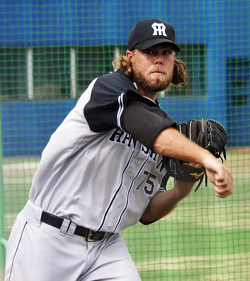 阪神タイガースのサターホワイト投手